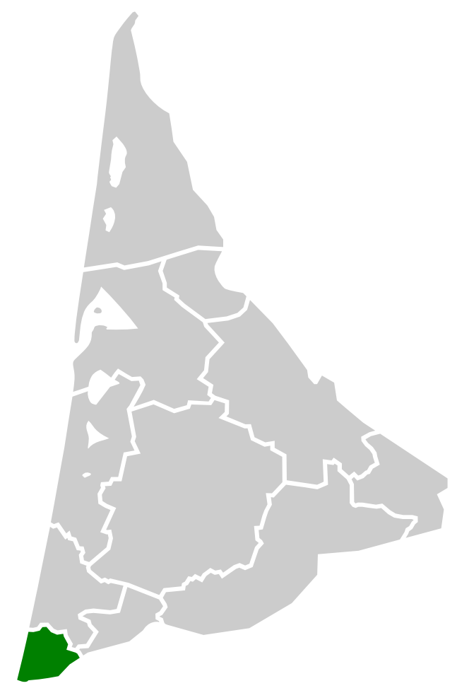 Localisation Maremne